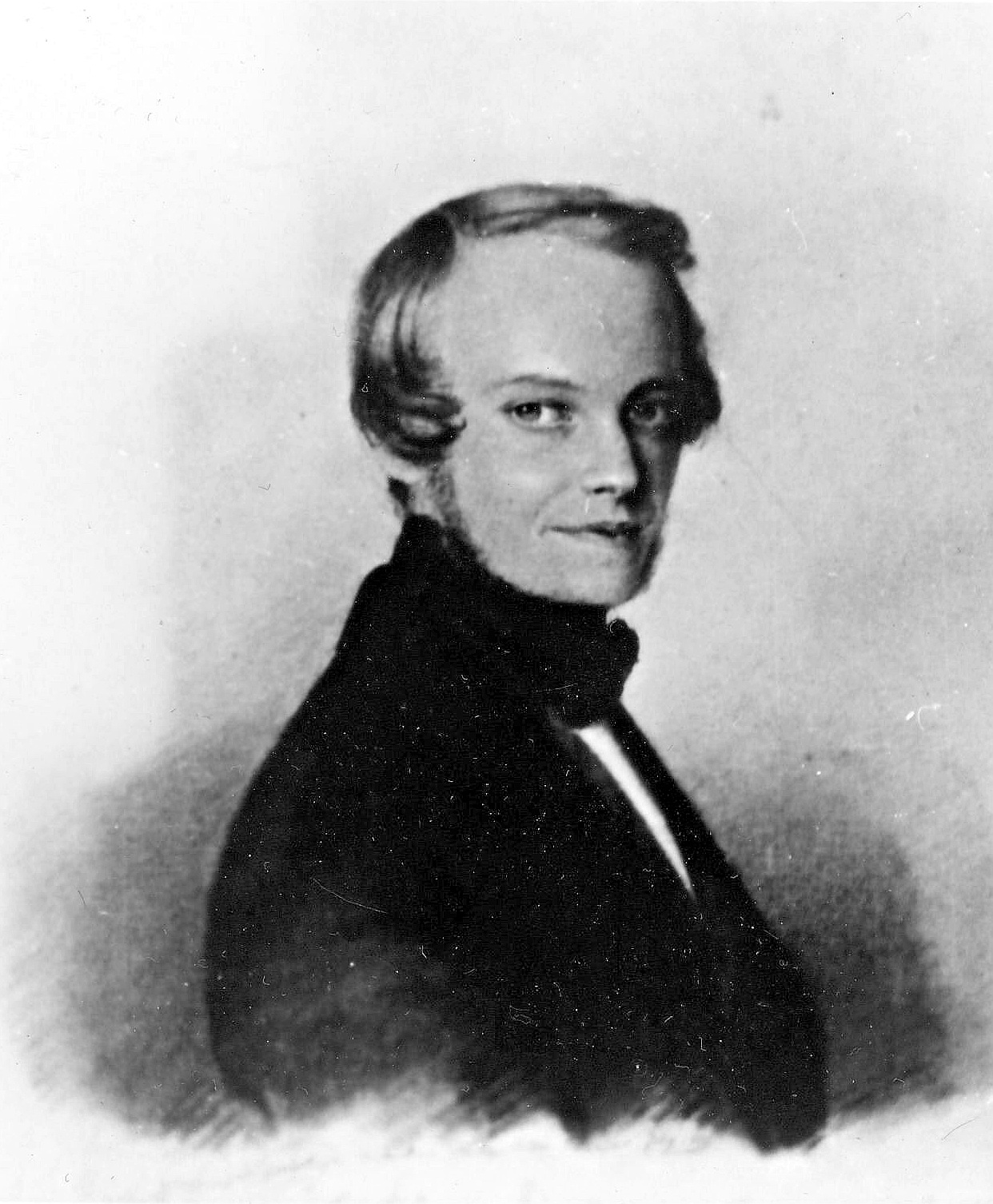 August Fuchs (1818-1847), deutscher Altphilologe, Romanist, Schulmann und Autor wissenschaftlicher Werke.